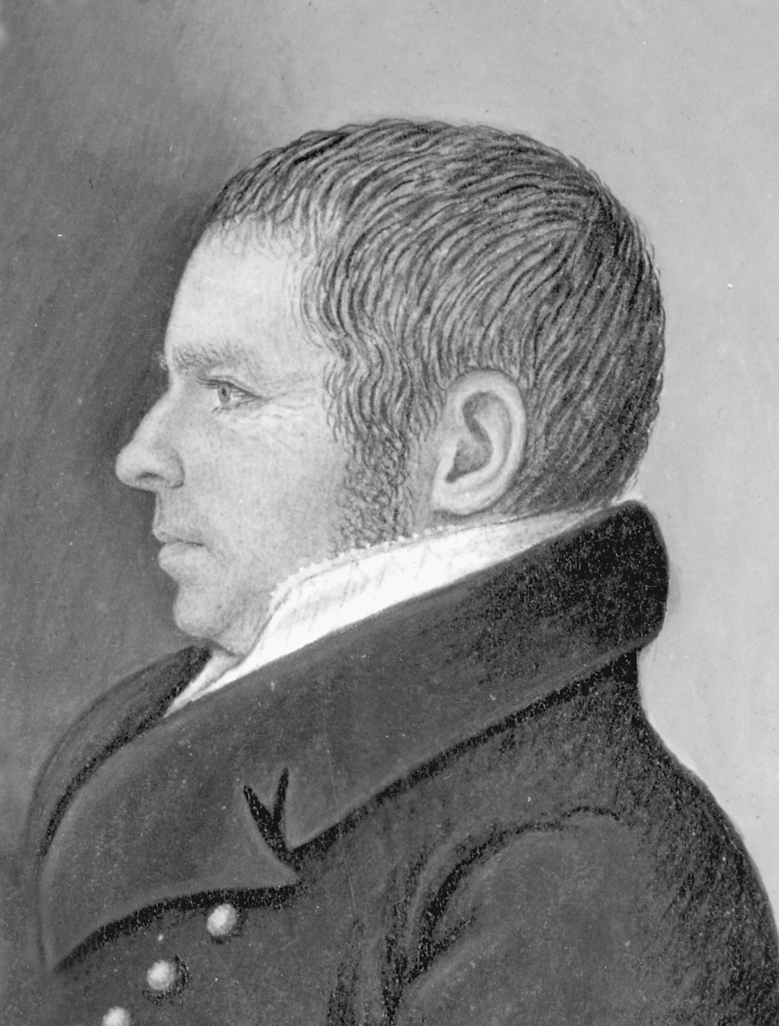 Johann Conrad Fischer (1773–1854)